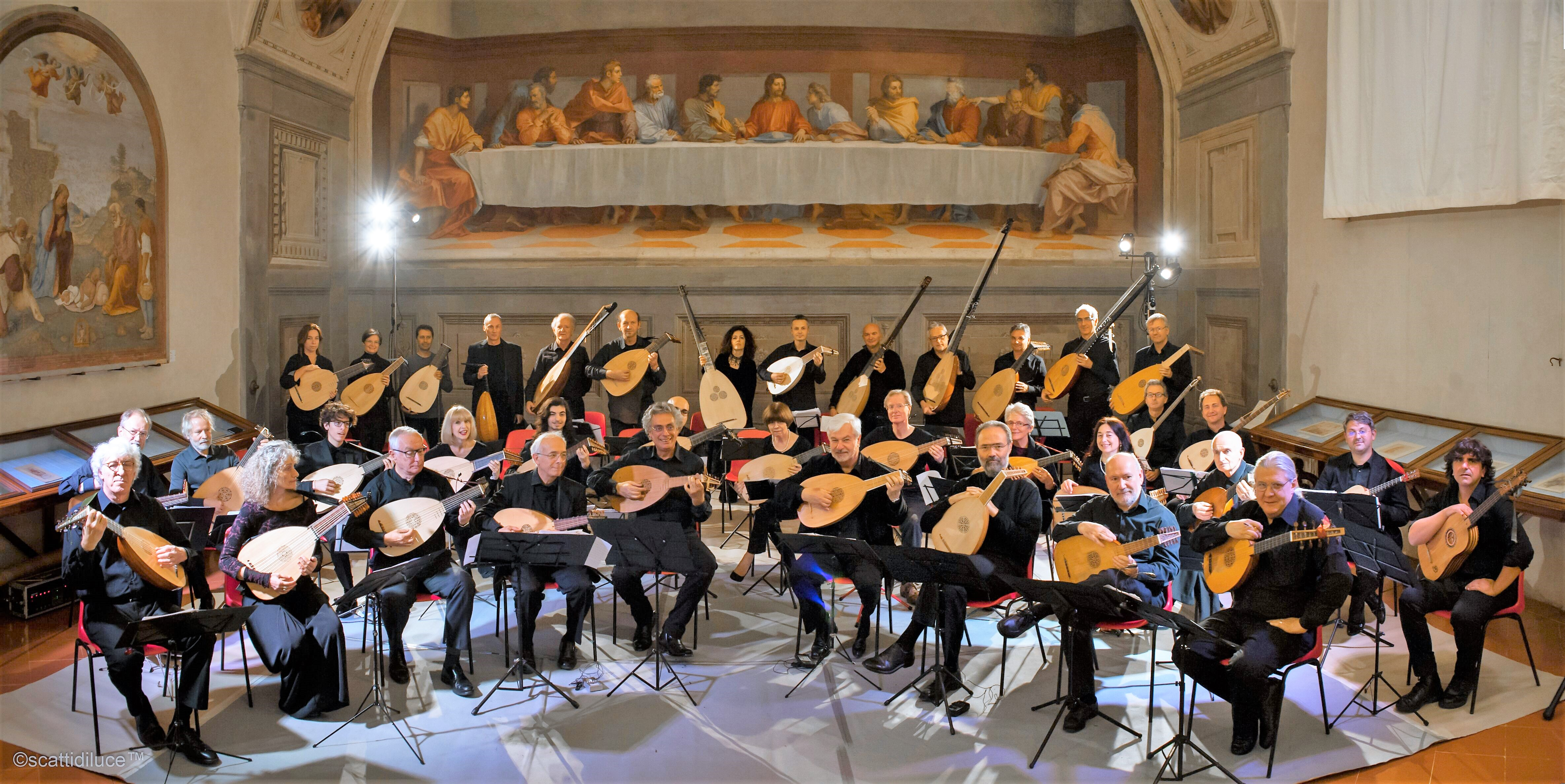 Bild mit freundlicher Genehmigung von Gian Luca Lastraioli. Die Aufnahme entstand 2015 in Florenz.